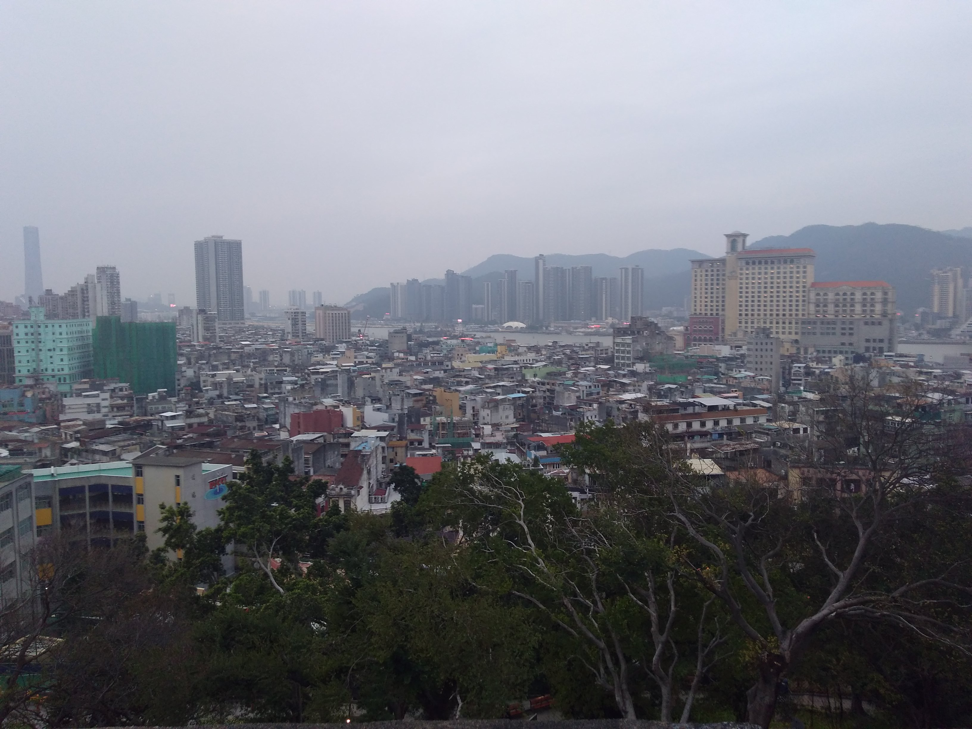 Zhuhai - widok z Fortaleza do Monte